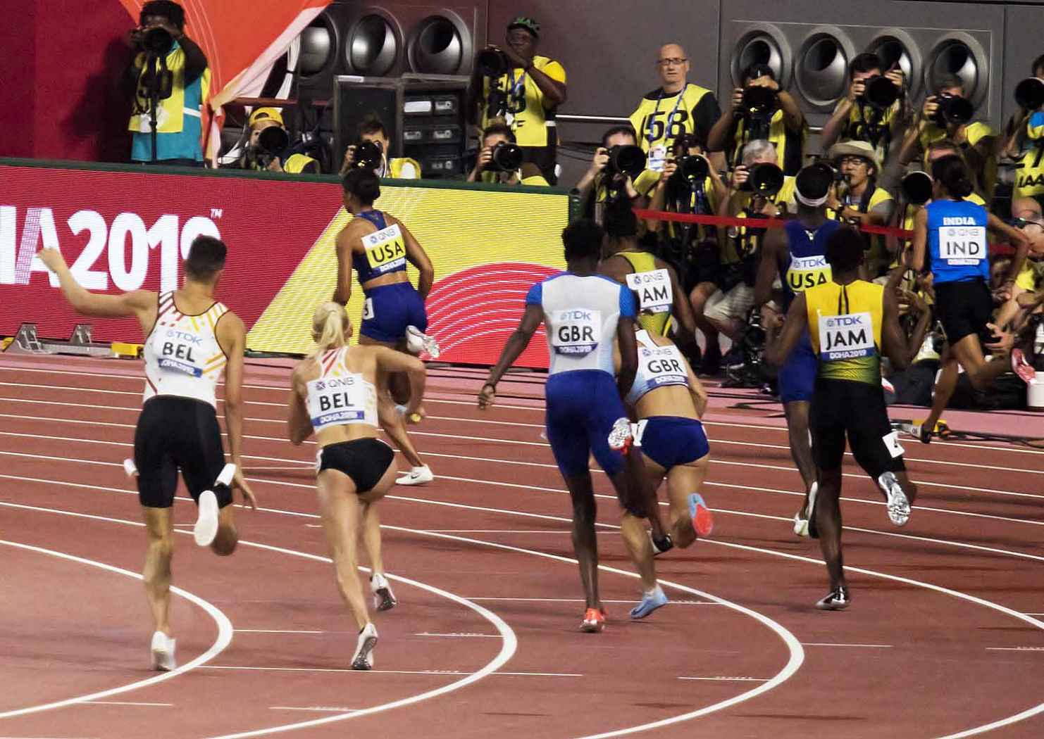 DOH30134 4x400 mix final